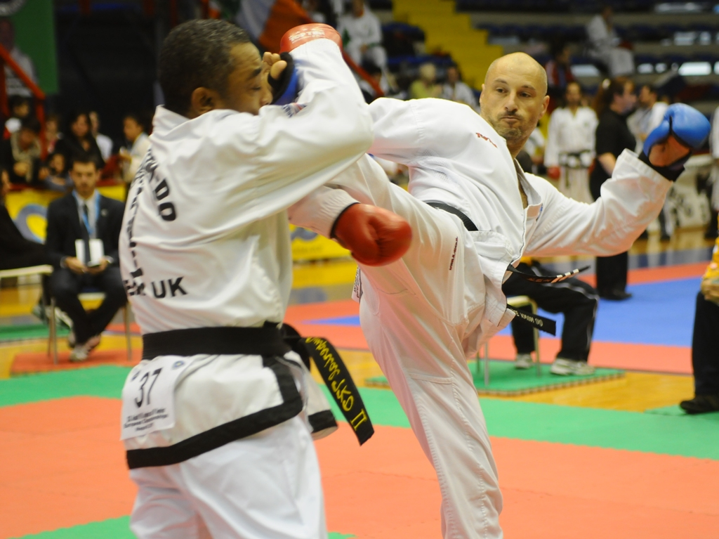 Detalj sa nastupa bh.reprezentacije na Evropskom prvenstvu u Italiji 2011.godine.